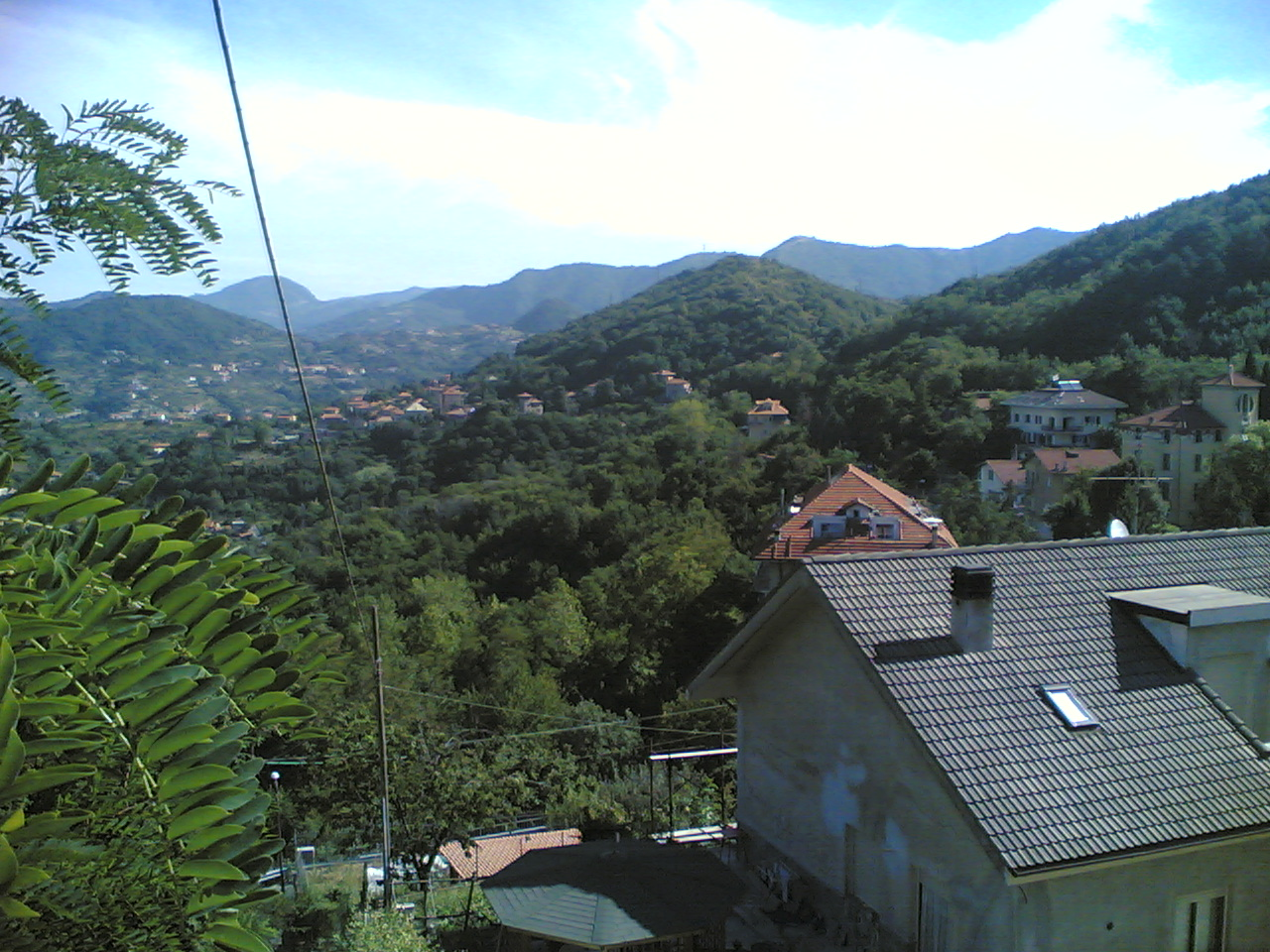 10.03 sabato 6 agosto 2005 Trensasco - Sant'Olcese